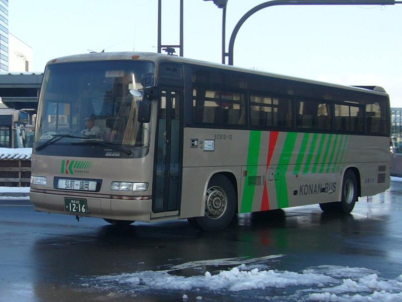 登録番号 青森22か12-26 弘南バス所属 ヨーデル号用 2007年1月29日 弘前駅前にて撮影 撮影者 Tokatsu kokubu